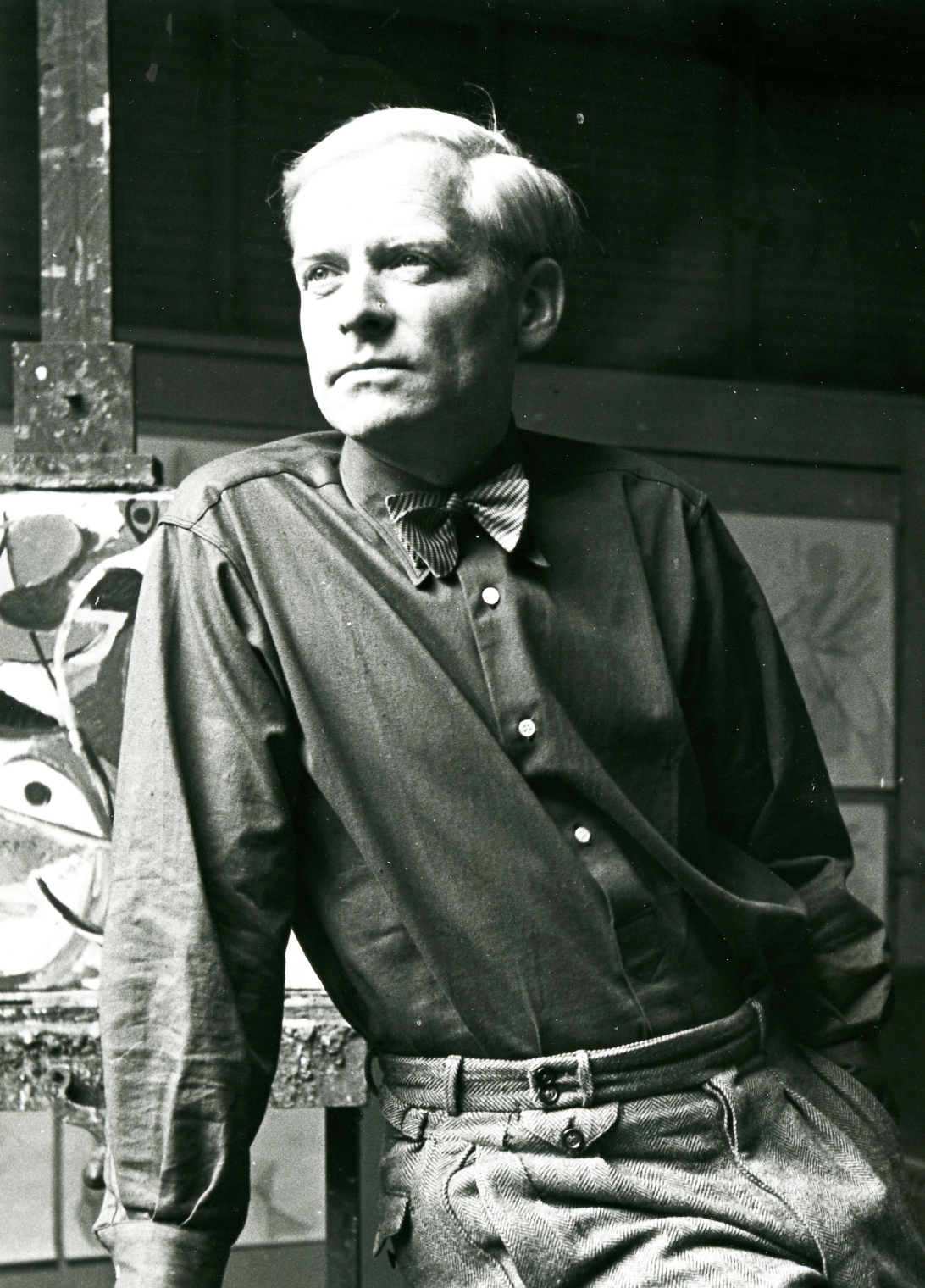 Ernst Wilhelm Nay in seinem Hofheimer Atelier, 1948; Foto: Privatarchiv Elisabeth Nay-Scheibler